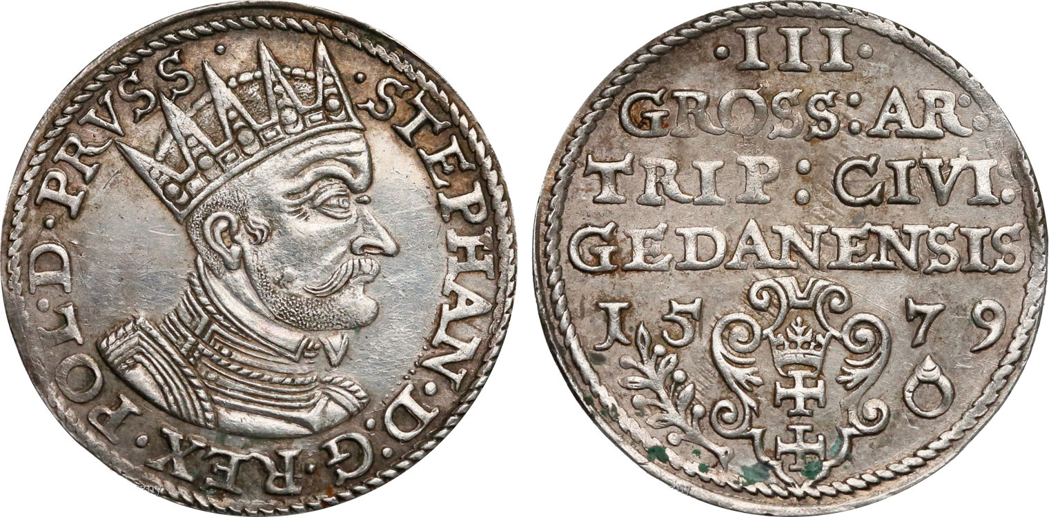 Trojak miejski Gdańsk 1579